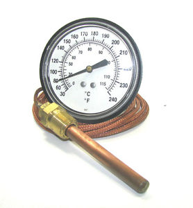 Termòmetre inventat per Stock.